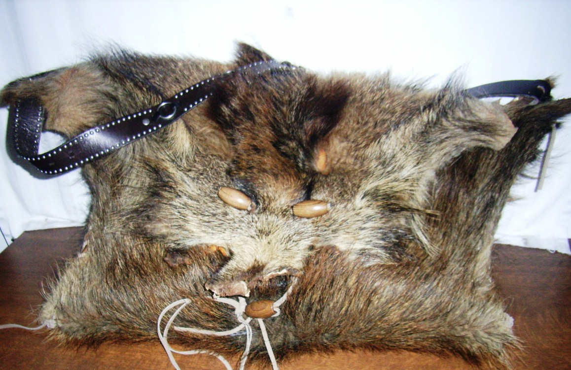 Tasche aus einer behaarten Wildschweinschwarte